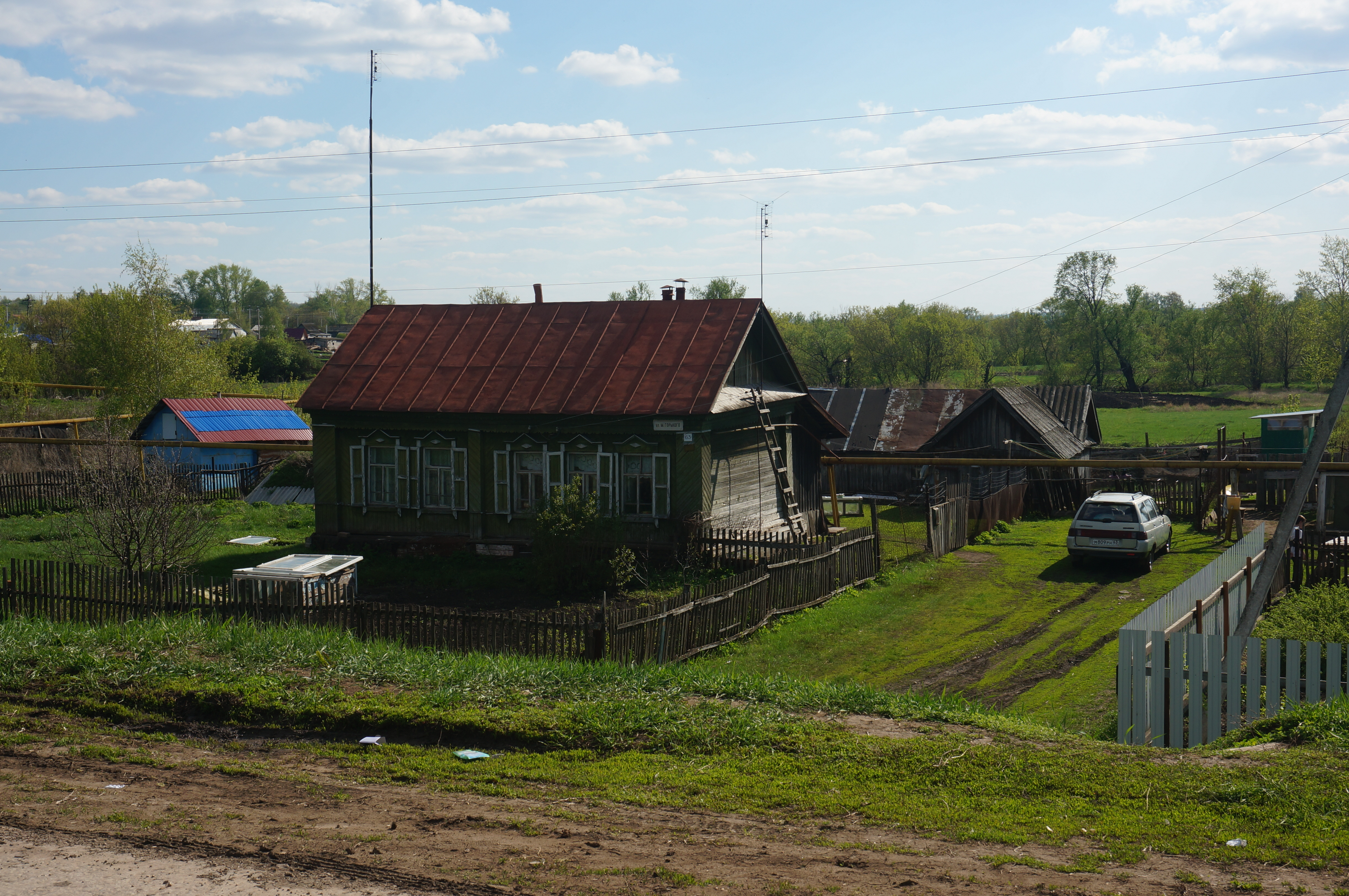 Село Чубовка Красноярского района Самарской области, Россия